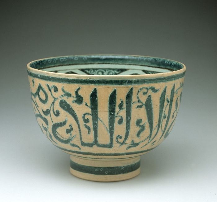 Schaal gedecoreerd met florale en kalligrafische motieven. De tekst op de schaal is de islamitische geloofsbelijdenis (shahada). De tekst van de shahada luidt: 'la ilaha illa Allah wa Muhammadun rasul Allah' (Er is geen god dan God en Mohammed is Gods Profeet). De schaal is gemaakt als kunstobject.